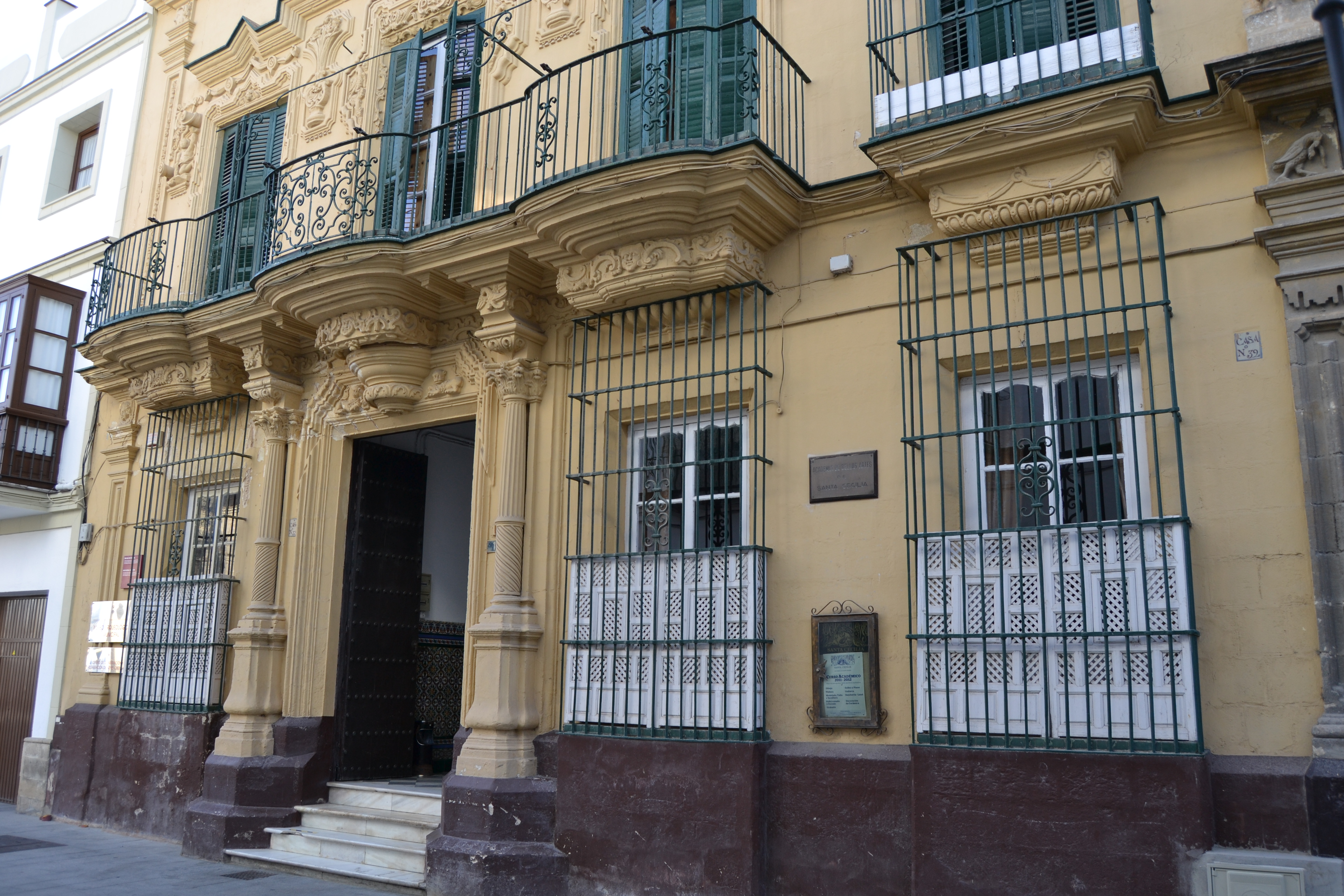 Academia de Bellas Artes de Santa Cecilia, El Puerto de Santa María, España.